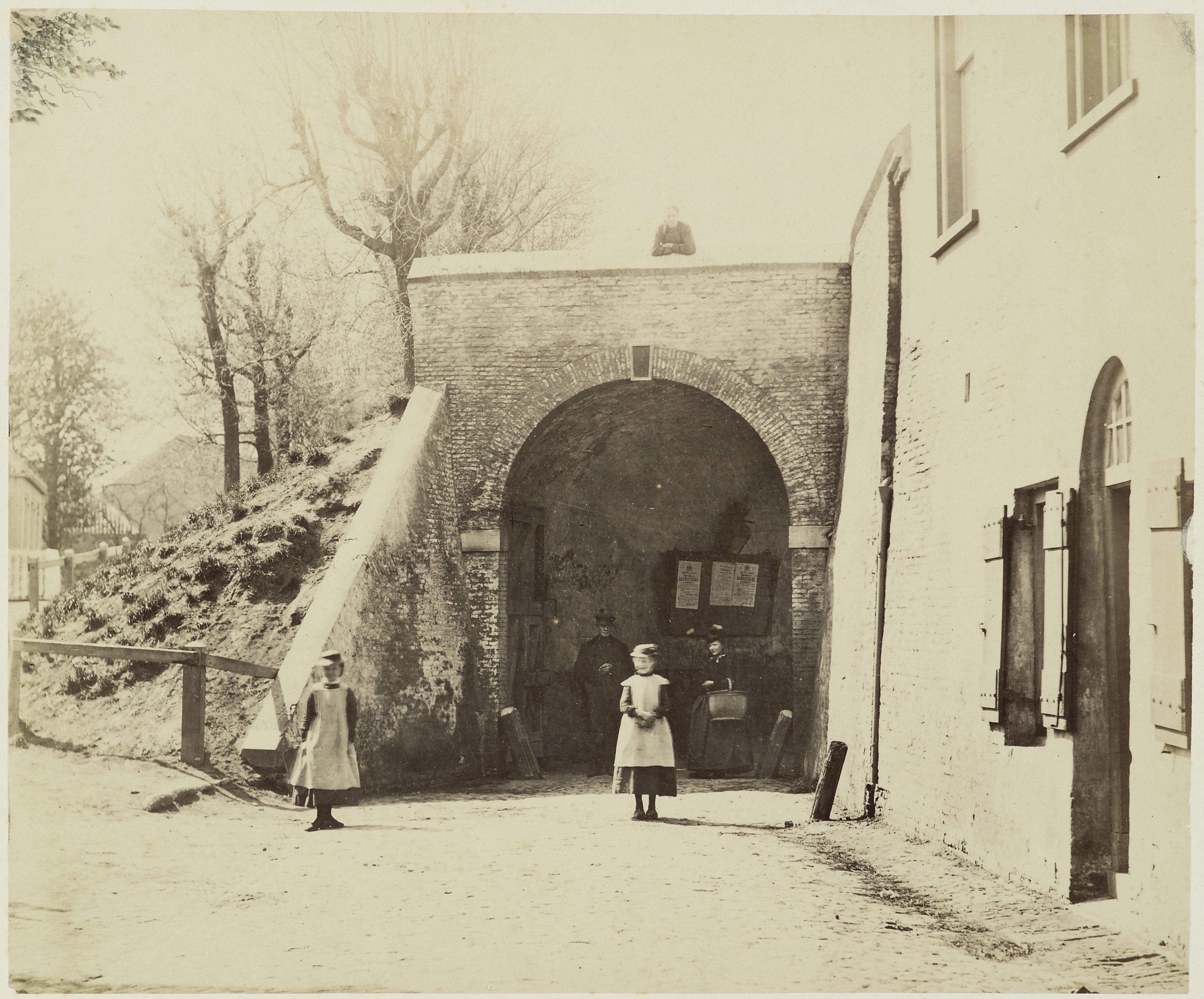 Sint Janspoort: Stadspoort binnenzijde (opmerking: Poserende mensen)